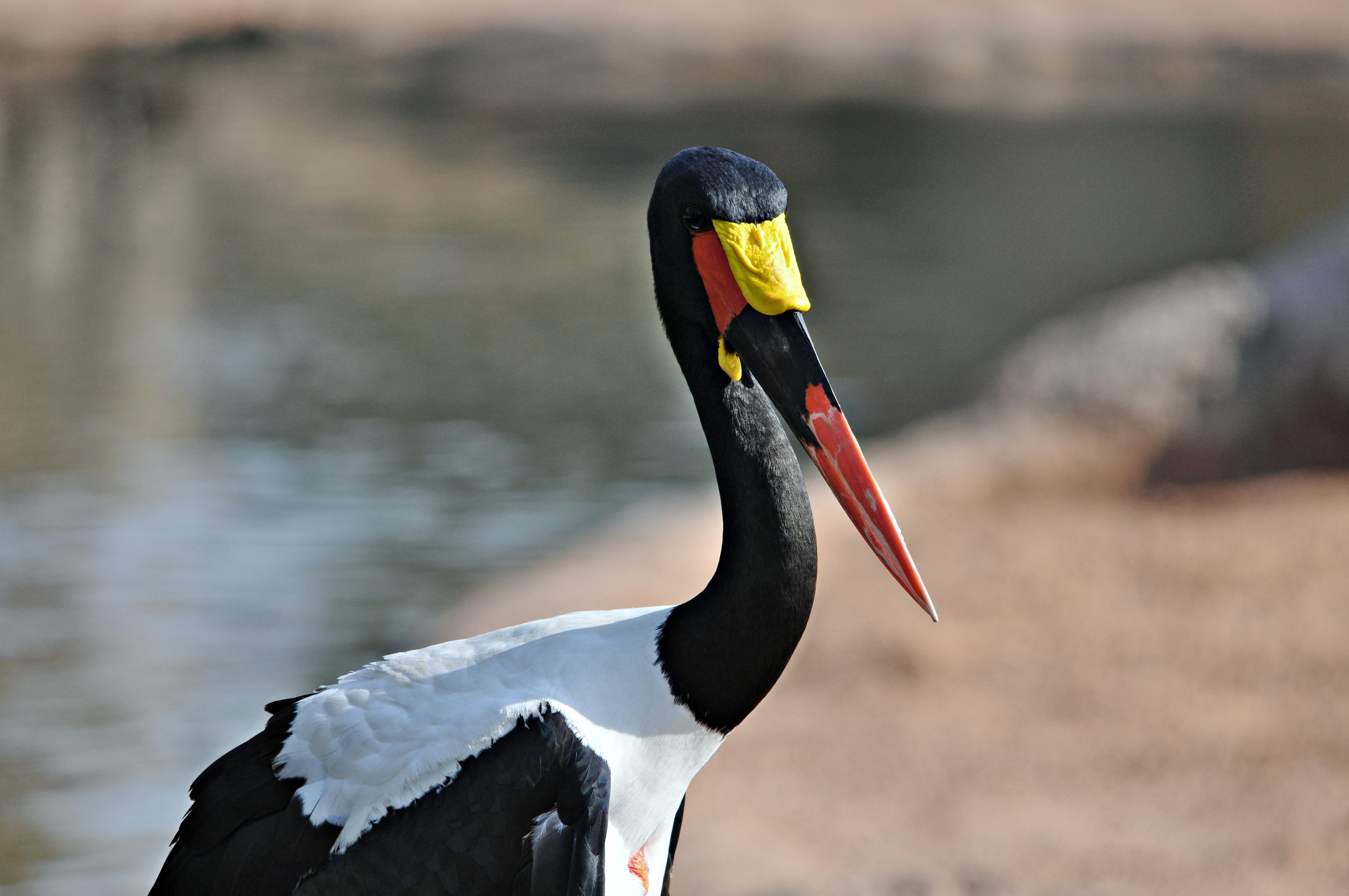 jabiru africano-comunidad valenciana-españa